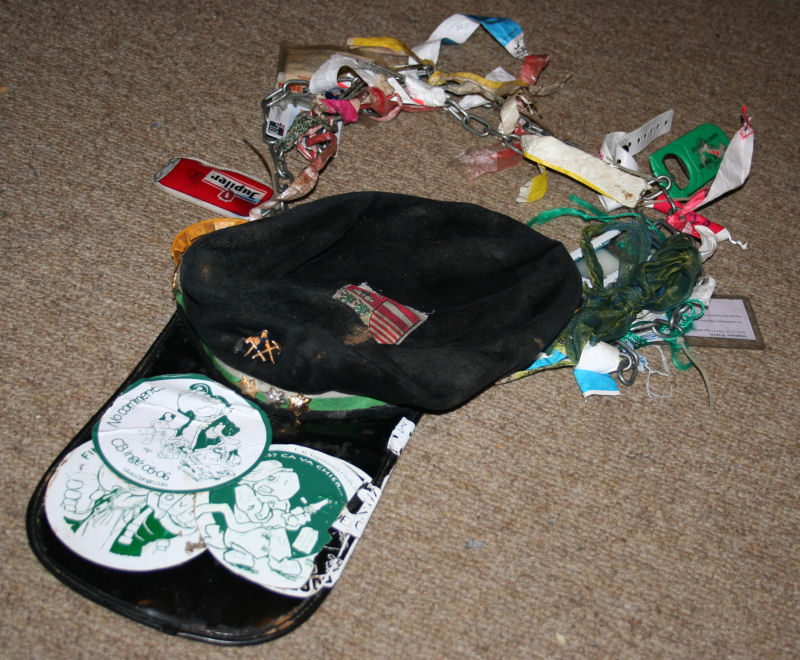 Penne (coiffe d'étudiant) d'un étudiant ingénieur civil à l'Université de Liège, baptisé en 2003.